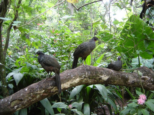 Ortalis ruficauda, de El Hatillo estado Miranda - Venezuela.